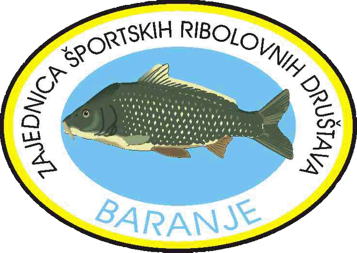 logo: Zajednica športskih ribolovnih društava Baranje